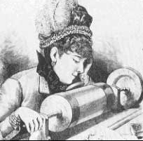 Fonografo Edison(1878)